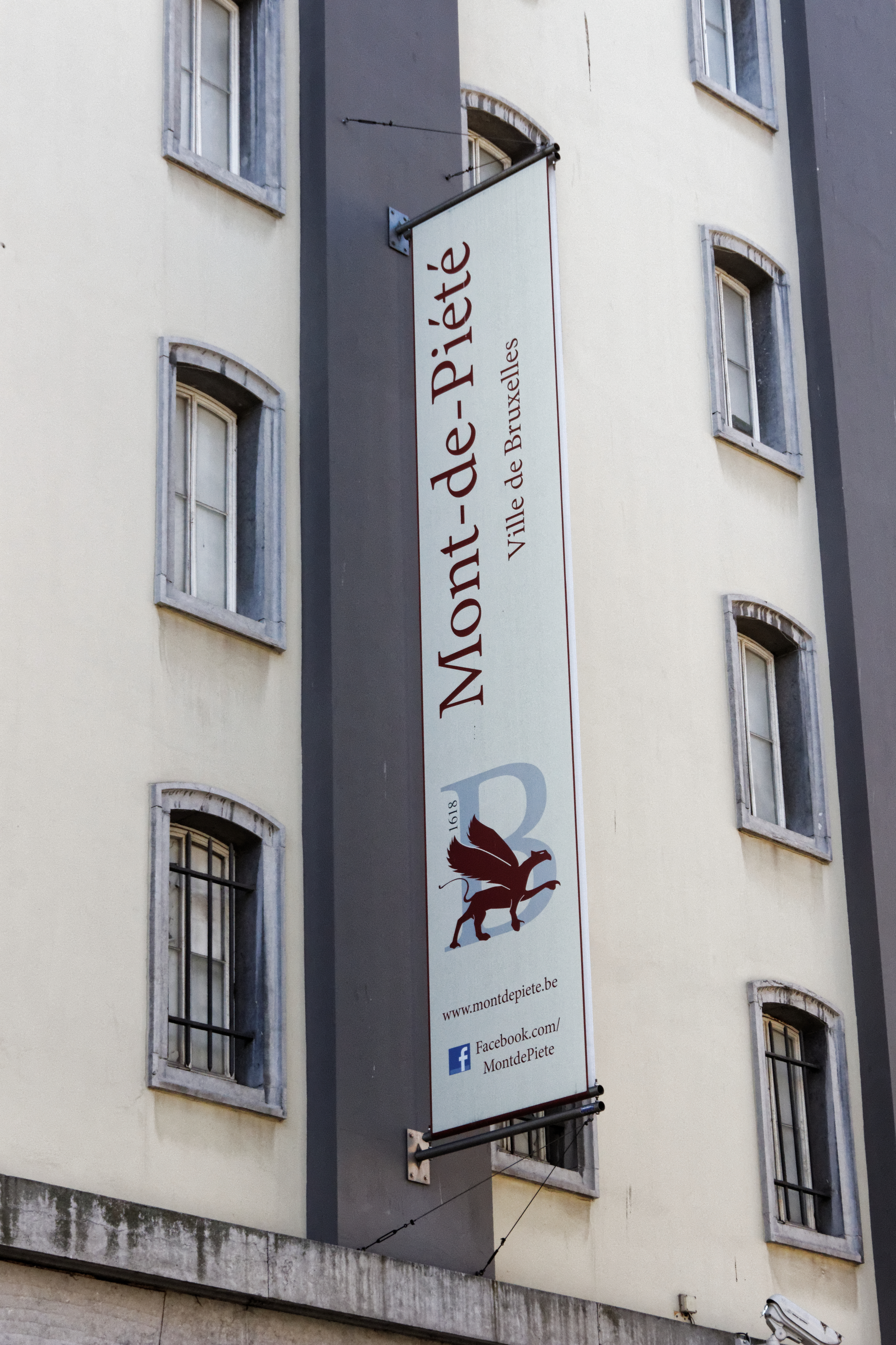 Mont-de-Piété, rue Saint-Ghislain 19-23, Bruxelles